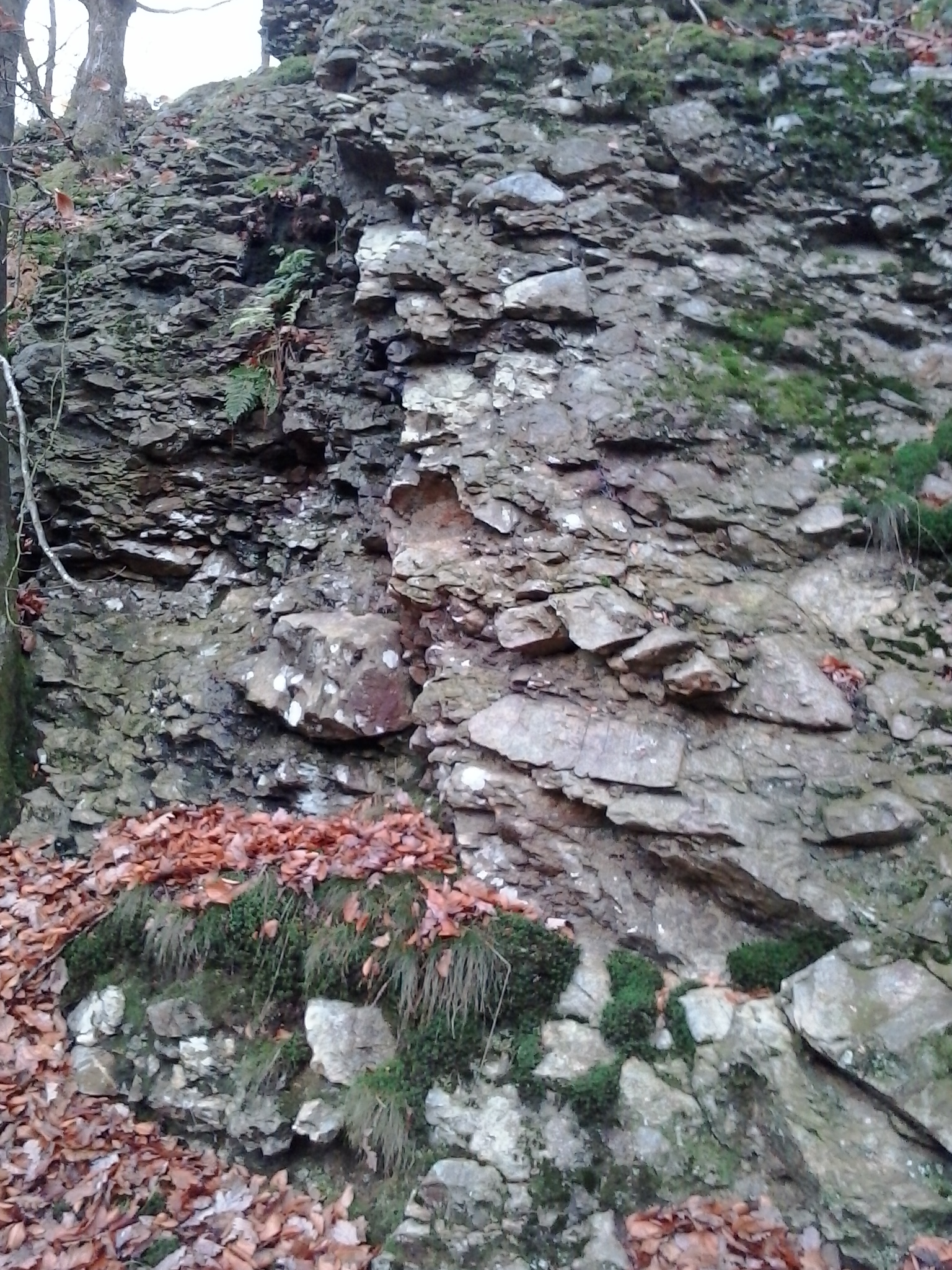 Poudingue dit de Fépin. Roche aux Corpias, Monthermé, Tournavaux, département des Ardennes, France